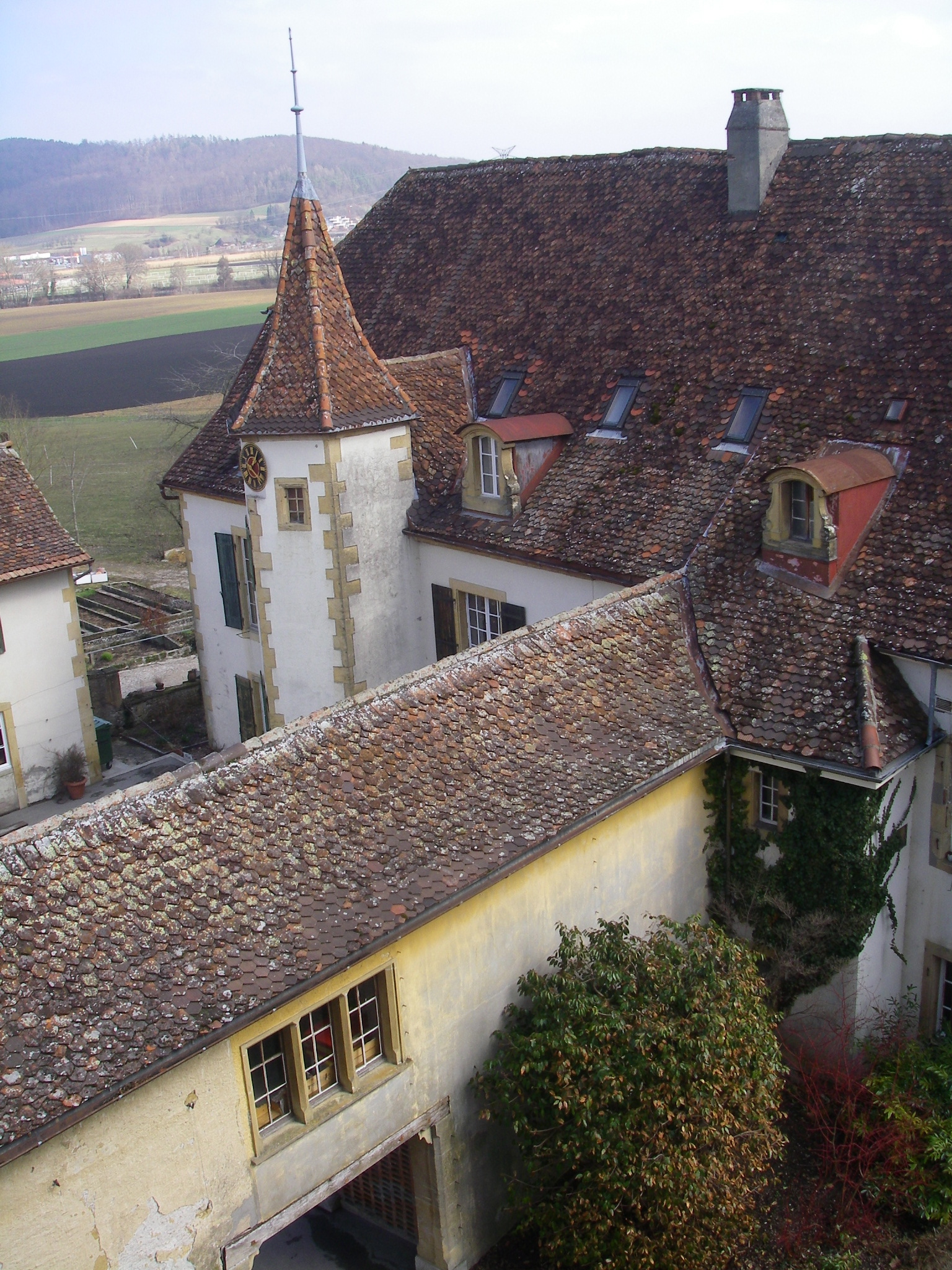 Blick auf das Schloss, ältester Teil des Anwesens